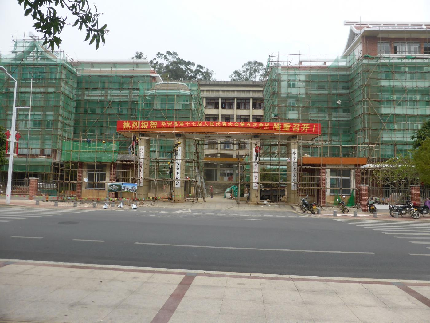 九龍江北側にある華安県人民政府